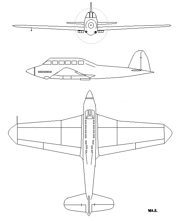 Riss einer SM 93